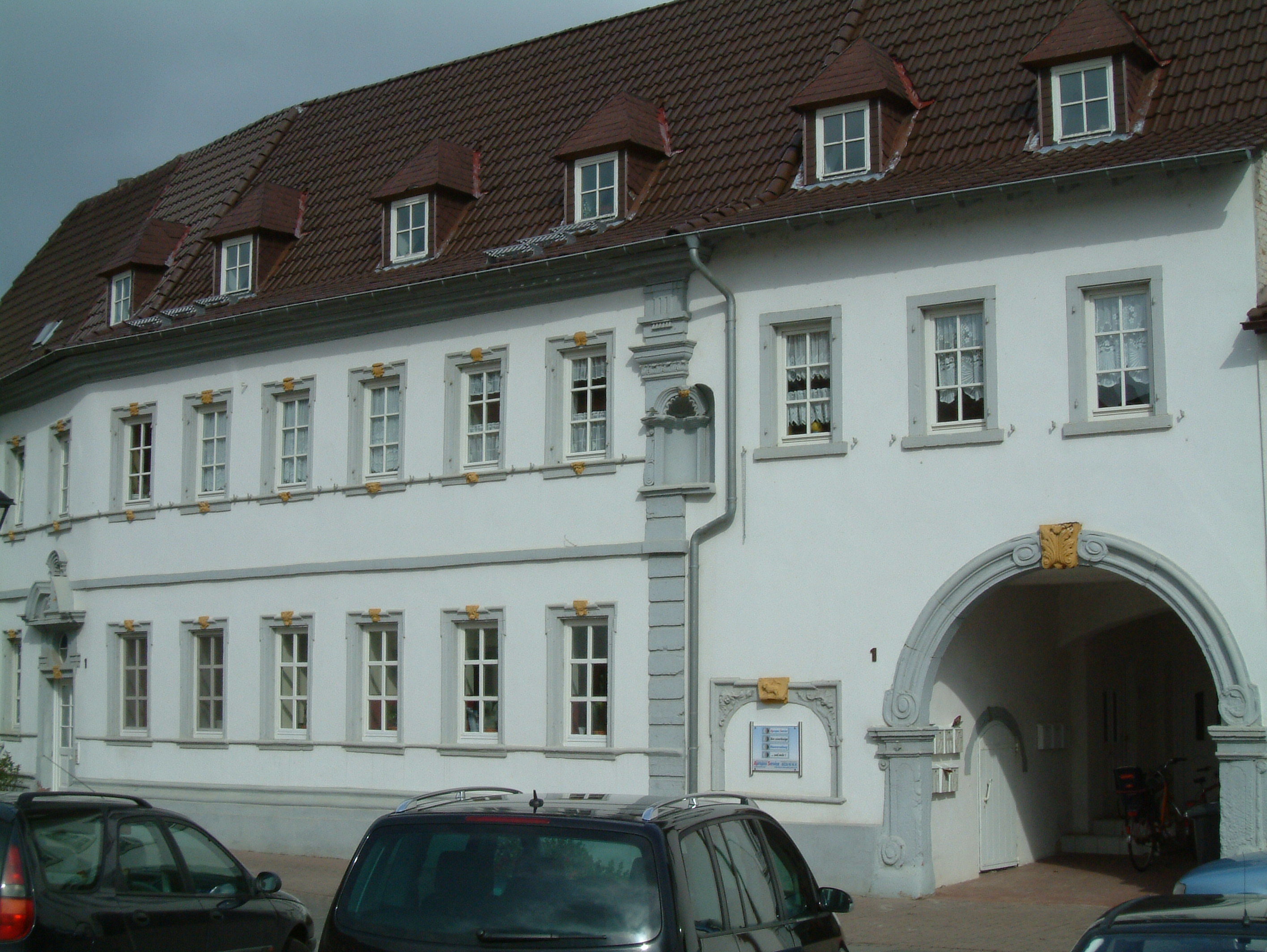 Ehem. Gasthaus Drei Könige zu Dirmstein